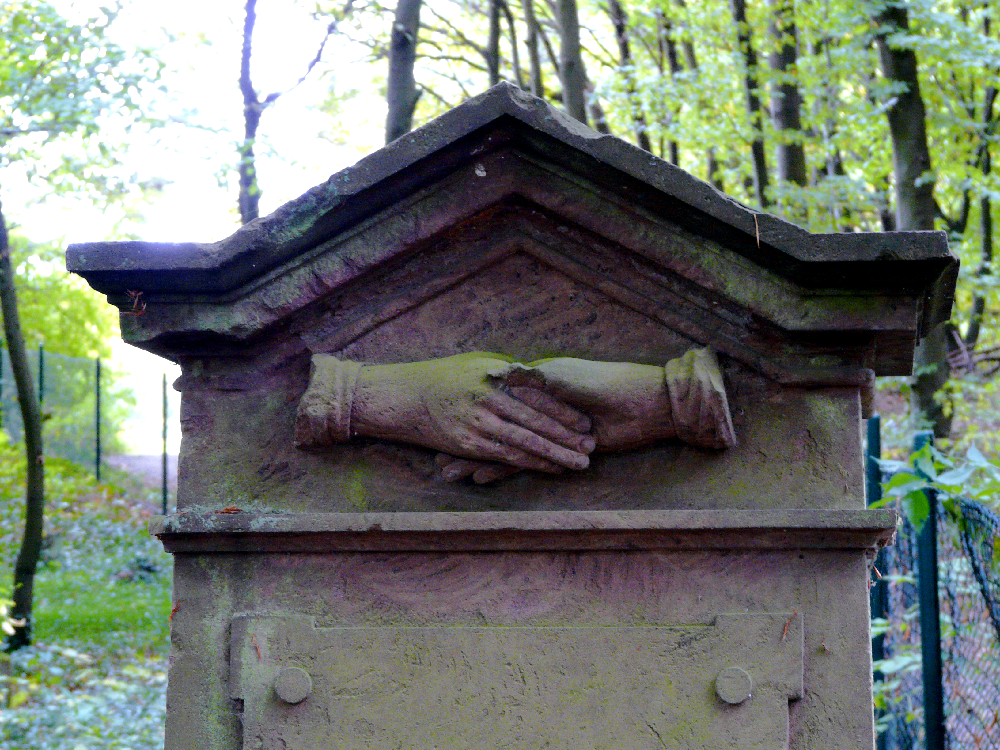 Bildinhalt: Jüdischer Friedhof Obergrombach Aufnahmeort: Bruchsal-Obergrombach, Deutschland